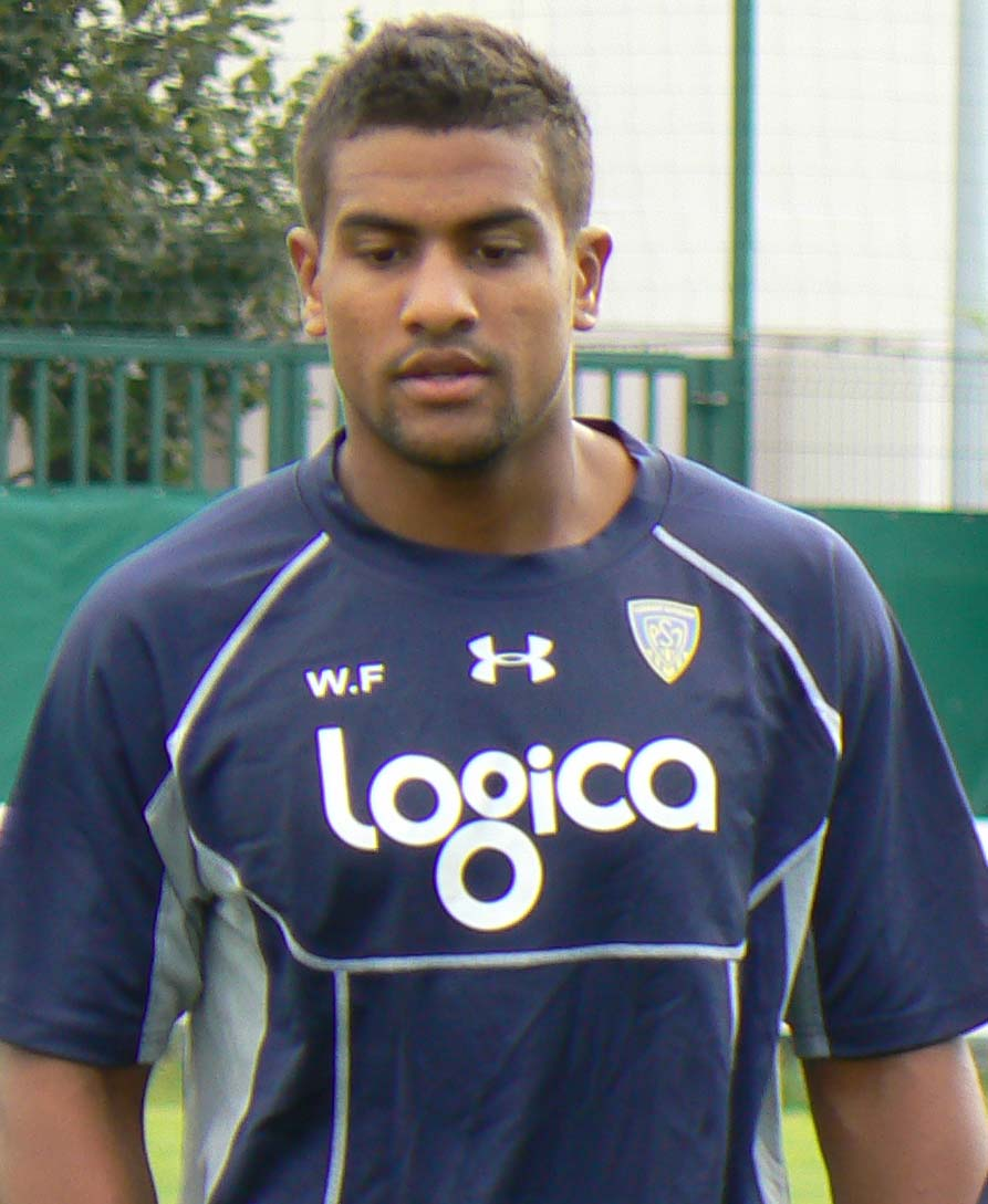 Le rugbyman français Wesley Fofana lors d'un entrainement avec l'ASM Clermont Auvergne